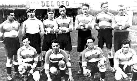 Equipe du FC Sète finaliste de la coupe de France 1924.